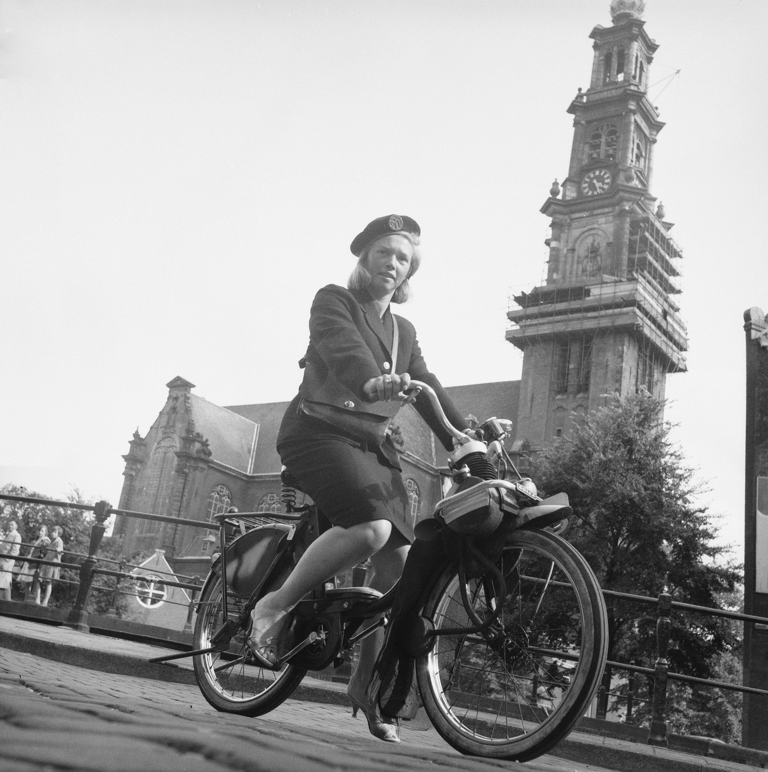 Collectie / Archief : Fotocollectie Anefo Reportage / Serie : [ onbekend ] Beschrijving : Vrouwelijke telegrambestelsters bij de Amsterdamse PTT Datum : 8 augustus 1962 Instellingsnaam : PTT Fotograaf : Nijs, Jac. de / Anefo Auteursrechthebbende : Nationaal Archief Materiaalsoort : Negatief (zwart/wit) Nummer archiefinventaris : bekijk toegang 2.24.01.03 Bestanddeelnummer : 914-1885